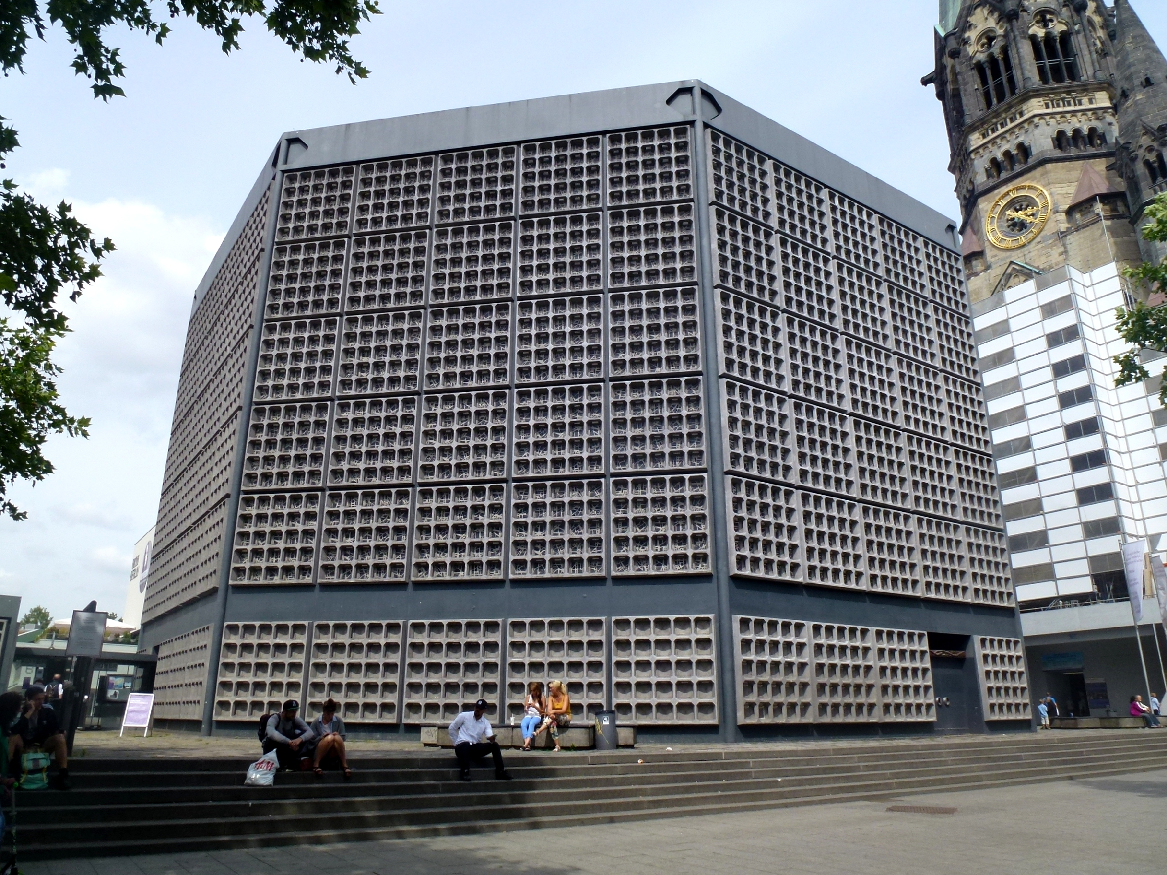 Kaiser Wilhelm Gedächtniskirche Berlin Germany